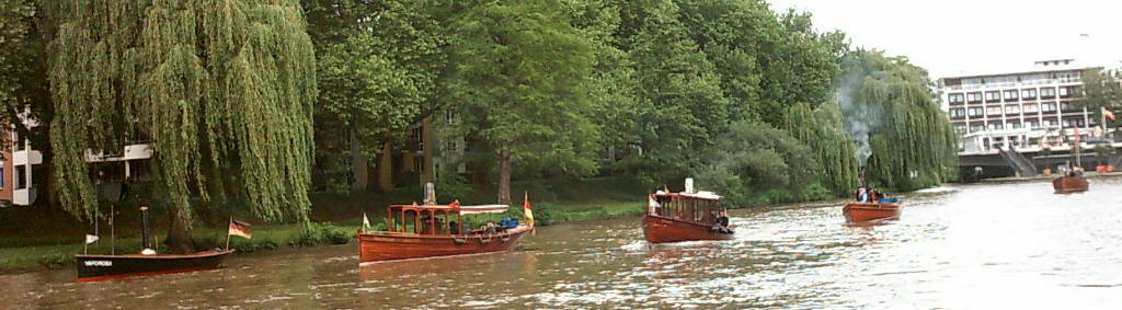 Startfeld Dampfbootrennen Heilbronn, rechts hinten das Insel-Hotel